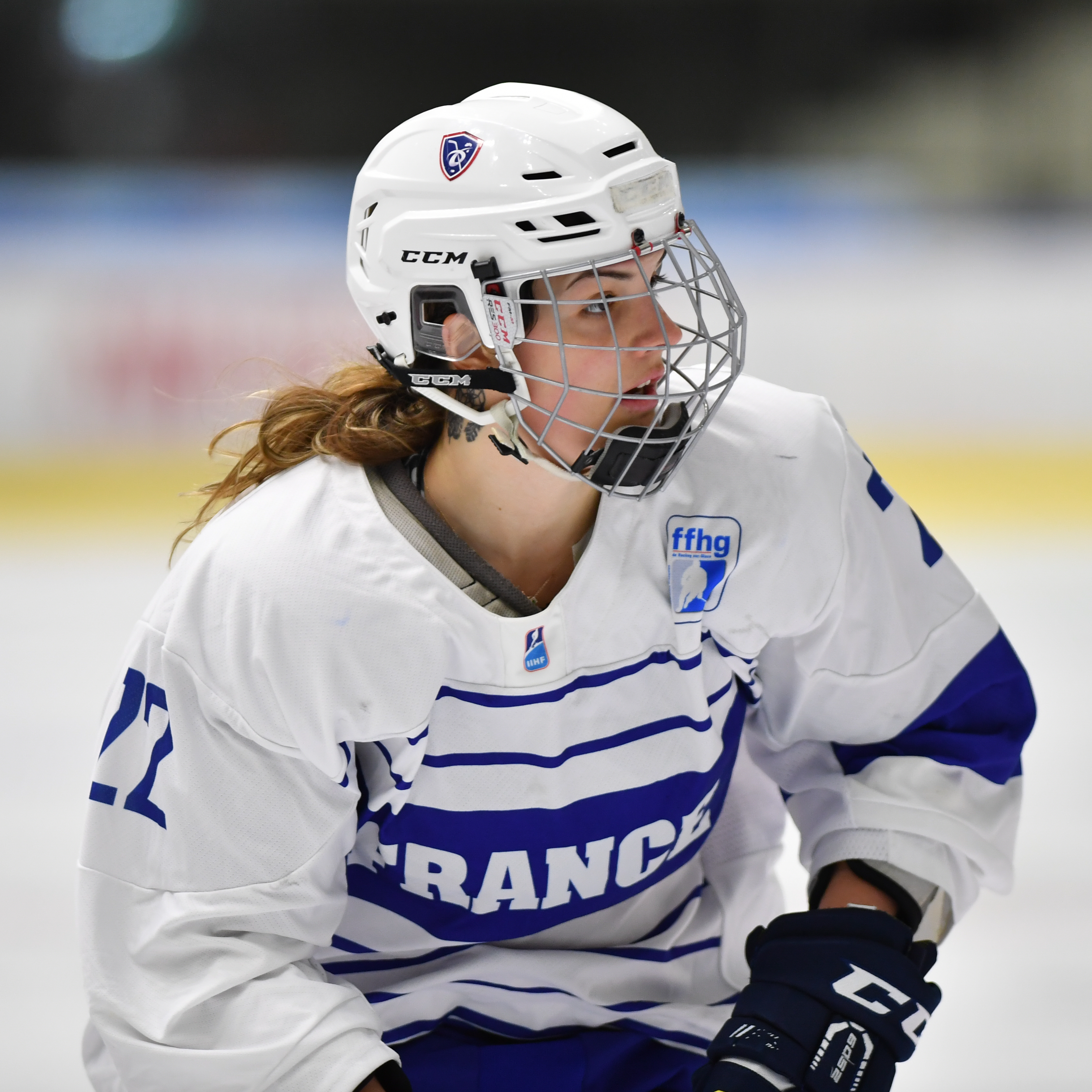 IIHF Eishockey Damen Weltmeisterschaft Division IA am 16. April 2017 in Graz.Bild zeigt Gwendoline GENDARME (FRA).